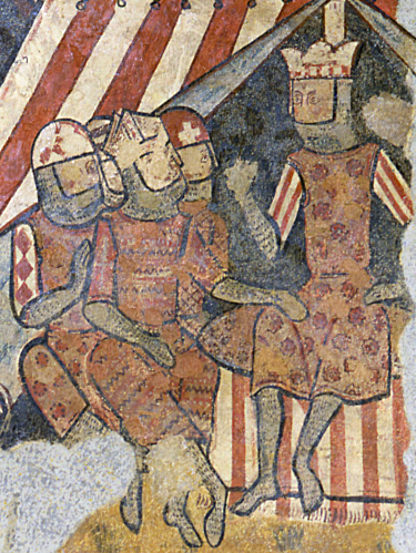 El obispo de Barcelona Berenguer de Palou y el rey Jaime I de Aragón en las pinturas murales de la conquista de Mallorca